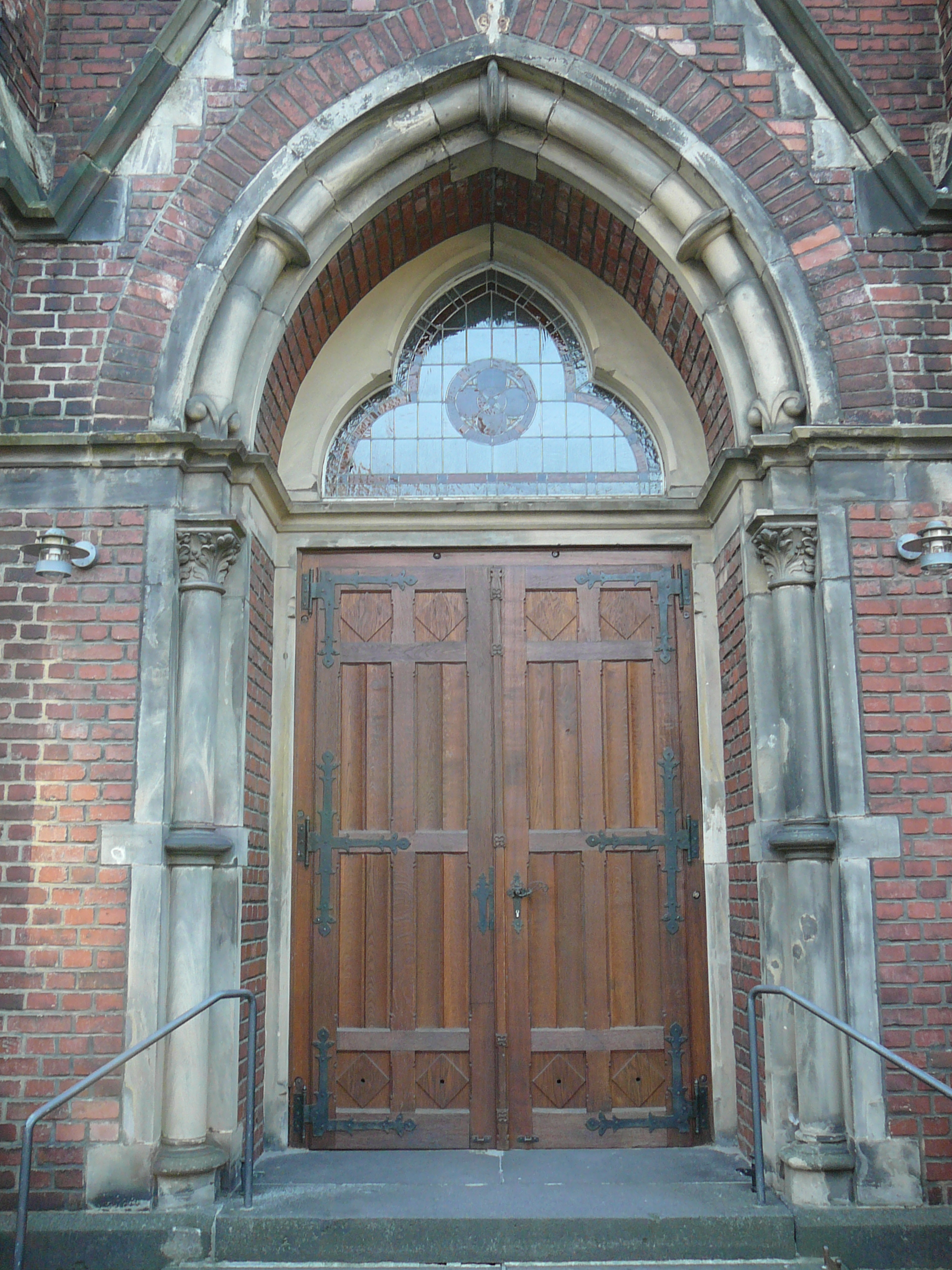 Gräfrather Straße, Wuppertal